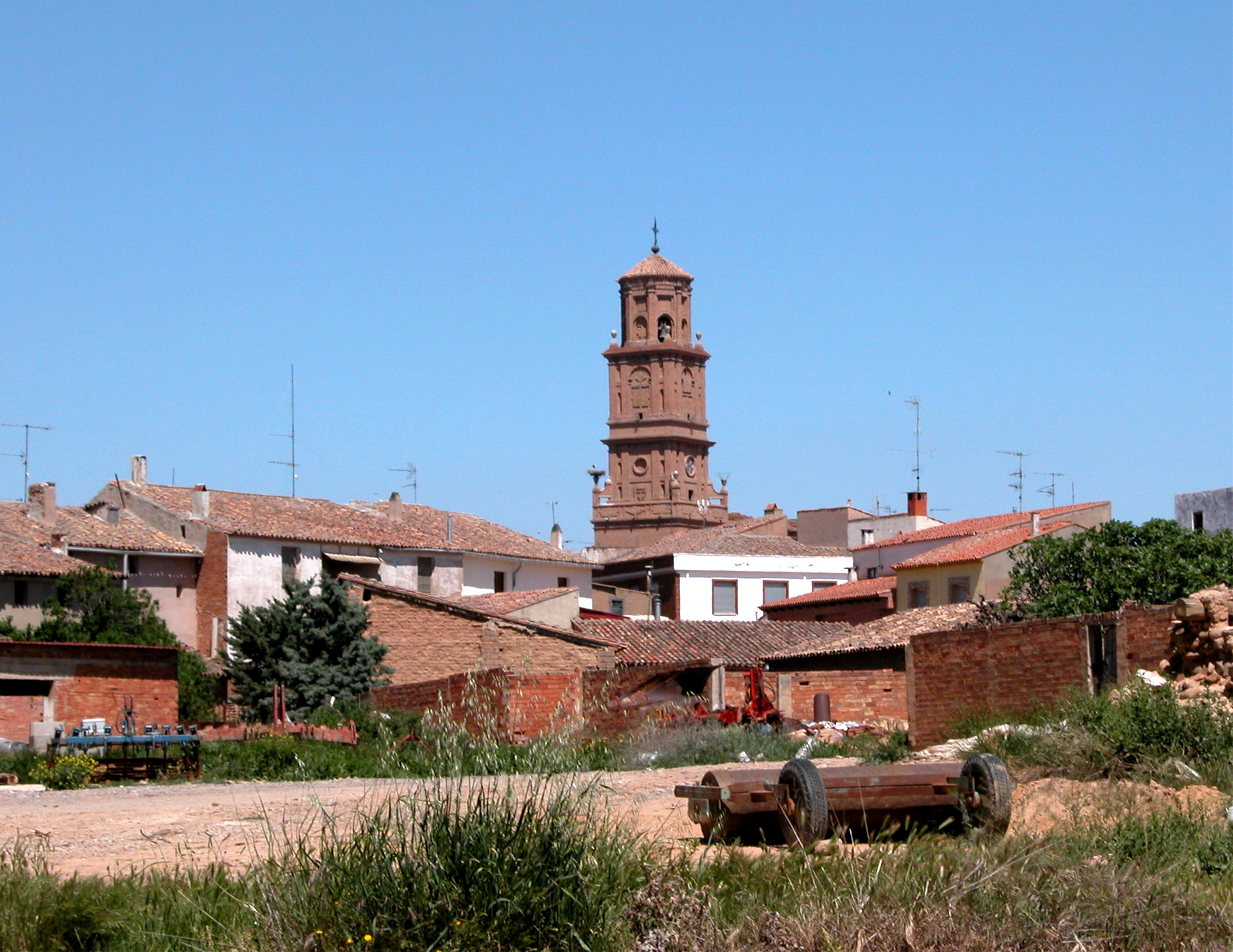 Aldeanueva de Ebro. Un pueblo eminentemente agrícola.